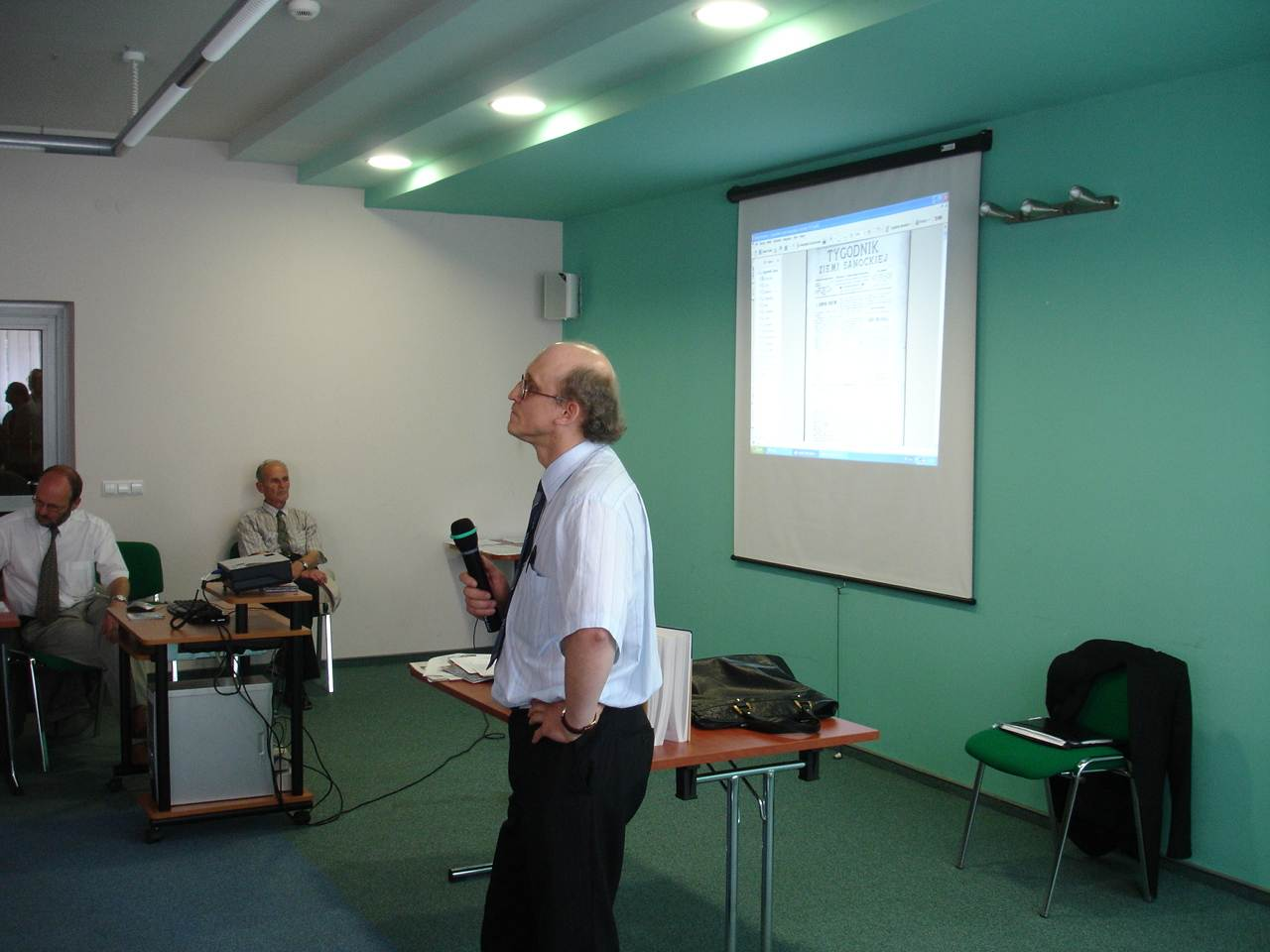 dr hab. Jarosław Moklak